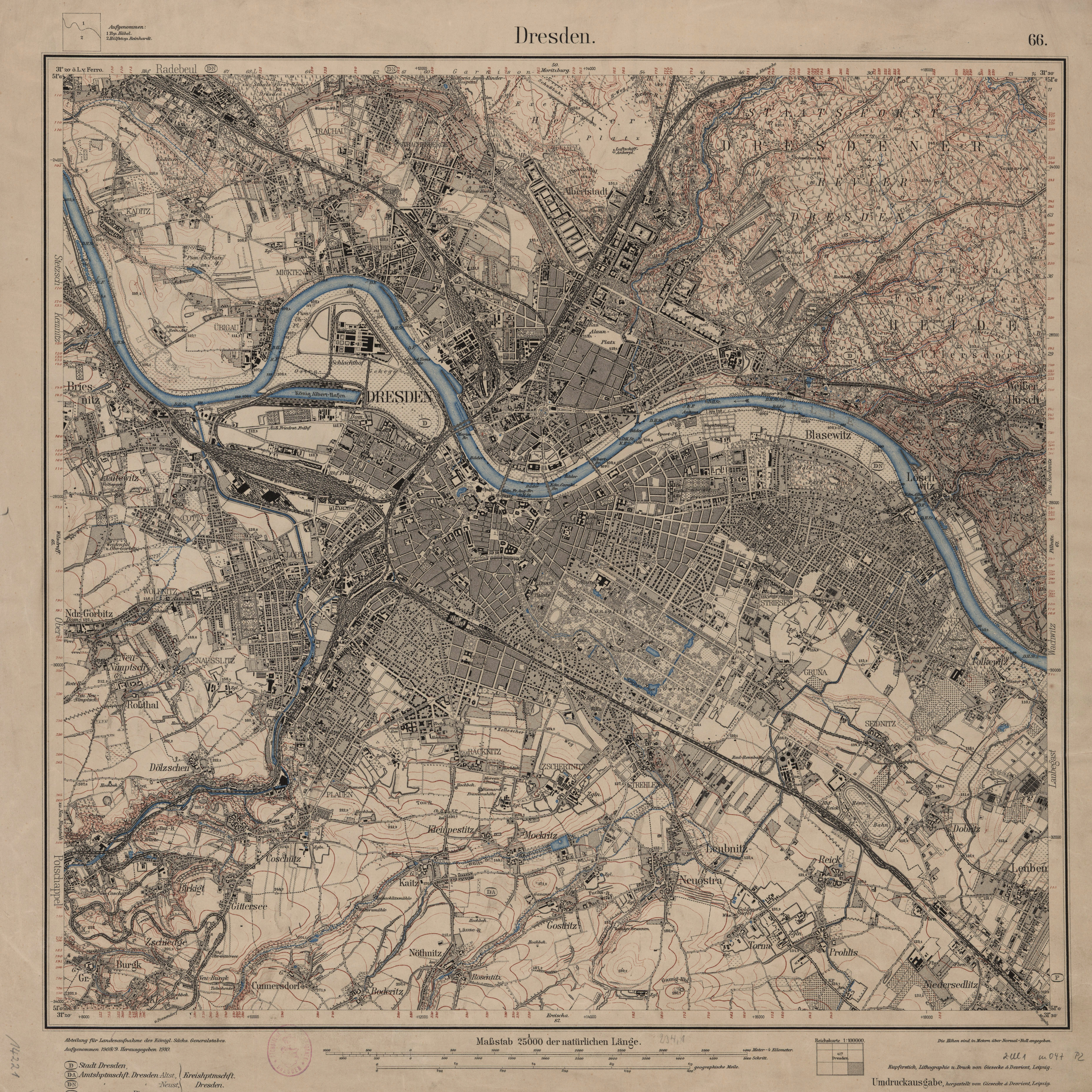 Topographische Karte (Messtischblätter) Sachsen, Ausschnitt Dresden, Abteilung für Landesaufnahme des Königl. Sächs. Generalstabes, 1:25000, 48 x 45 cm, Blatt 66, 1910.